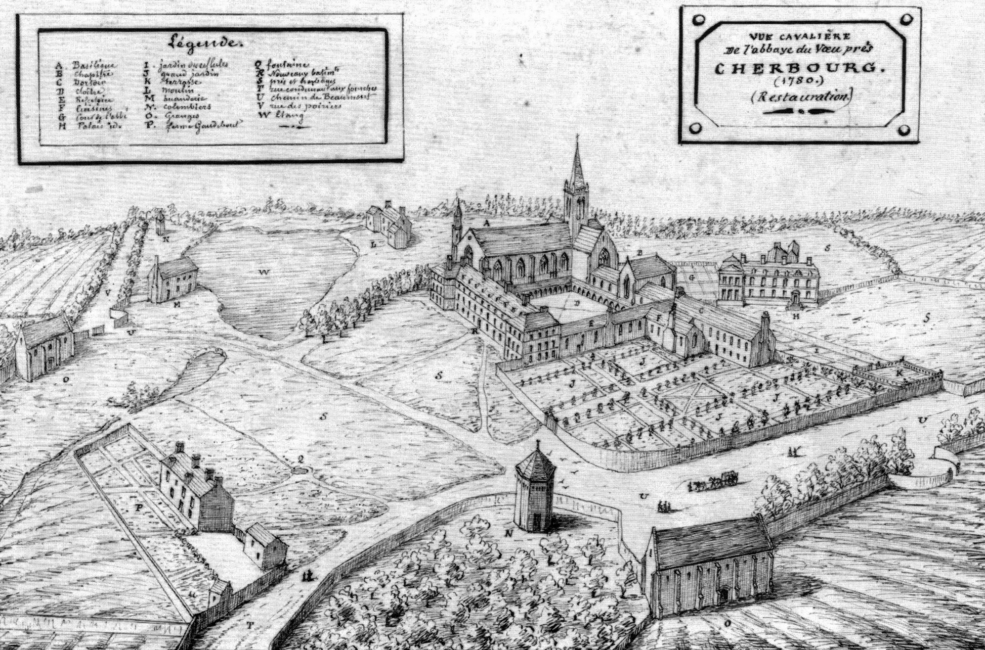 Vue cavalière de l'abbaye du Vœu près de Cherbourg, dessin à la plume, fin XVIIIe siècle, Archives départementales de la Manche, série FI. Légende. A : basilique ; B : chapitre ; C : dortoir ; D : cloître ; E : réfectoire ; F : cuisines ; G : cour de l'abbé ; H : palais de l'abbé ; I : jardin des cellules ; J : grand jardin ; K : terrasse ; L : moulin ; M : buanderie ; N : colombiers ; O : grange ; P : ferme ; Q : fontaine ; R : nouveaux bâtiments ; S : prés et herbages ; T : rue conduisant aux fourches ; U : chemin de Beaumont ; V : rue des poiriers ; W : étang.